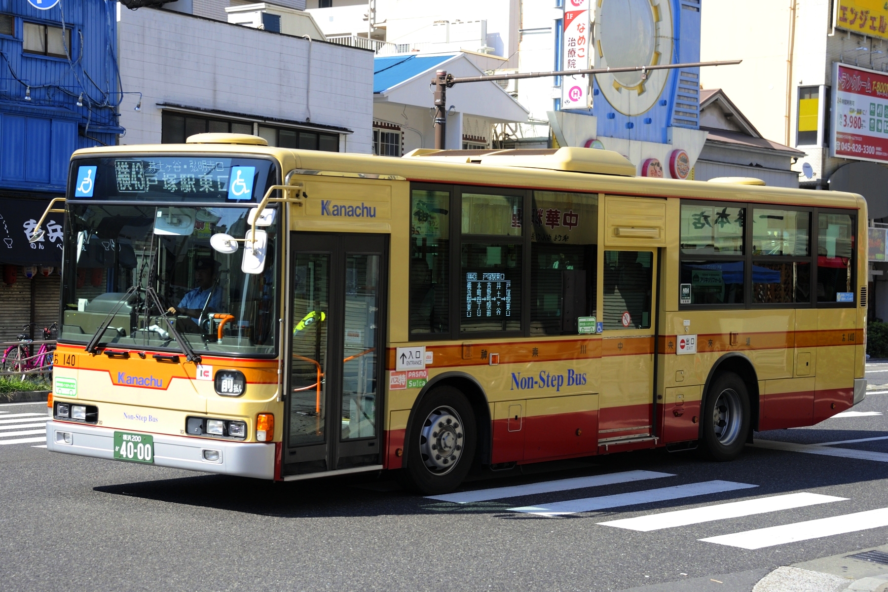 神奈川中央交通舞岡営業所所属「お140」号車